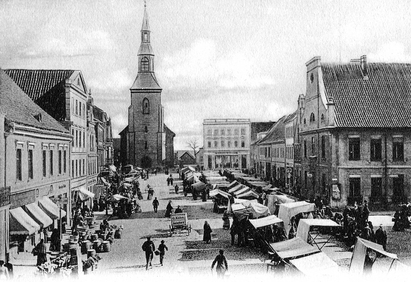 Insterburg